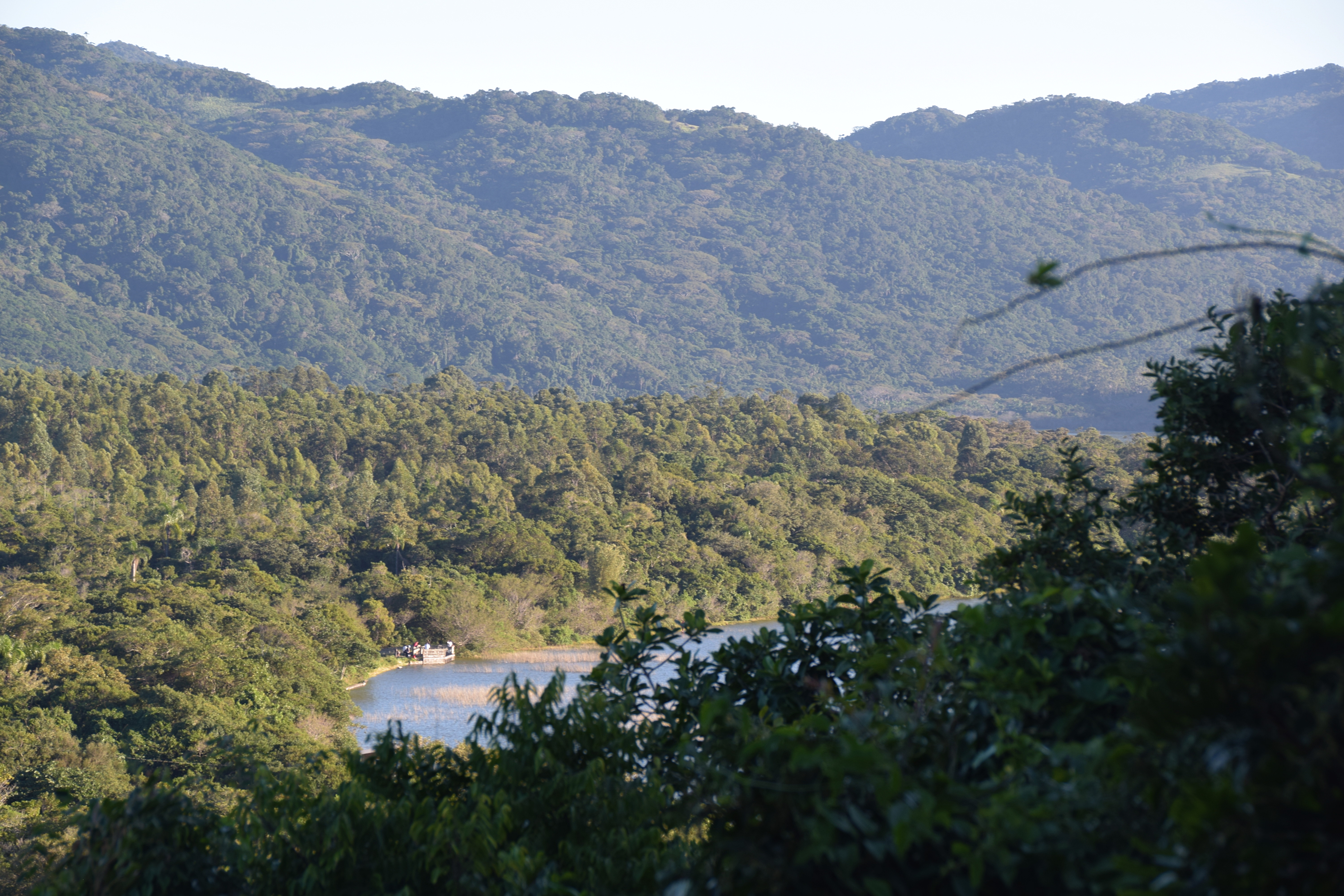 Área de preservação vista a partir do mirante do Morro das Pedras